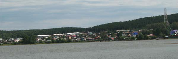 село Курганово, вид с Макаровского водохранилища